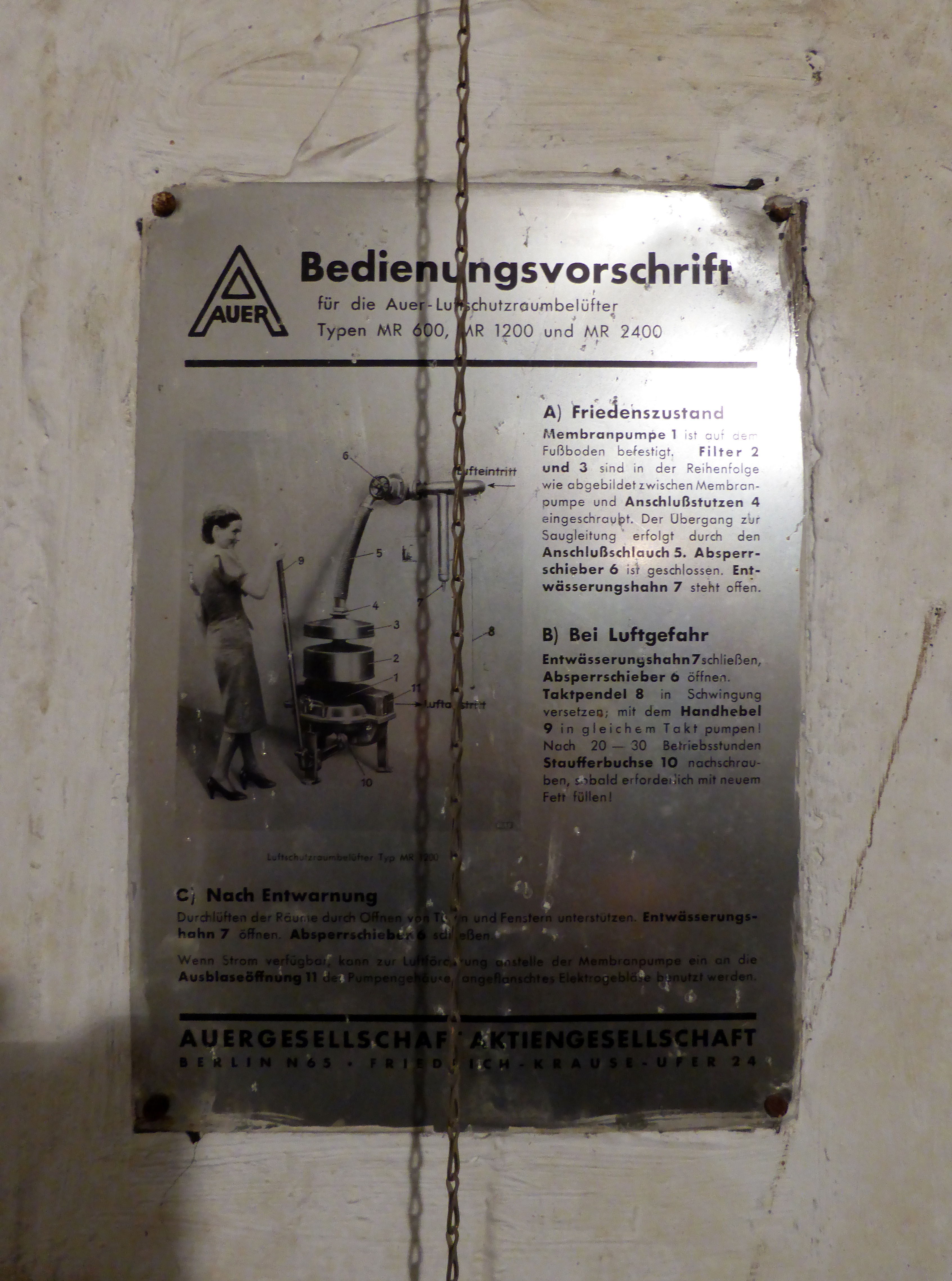 Röhrenbunker Oberlandesgericht Köln, unter dem Reichenspergerplatz.